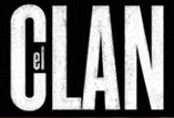 Portada de la película de Pablo Trapero.